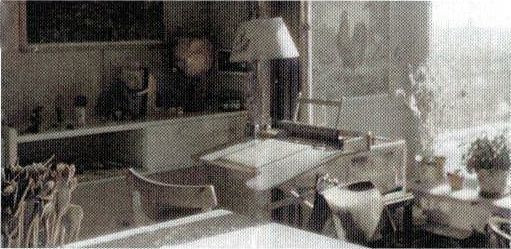 Inneneinrichtung der Villa Wolf in Guben.